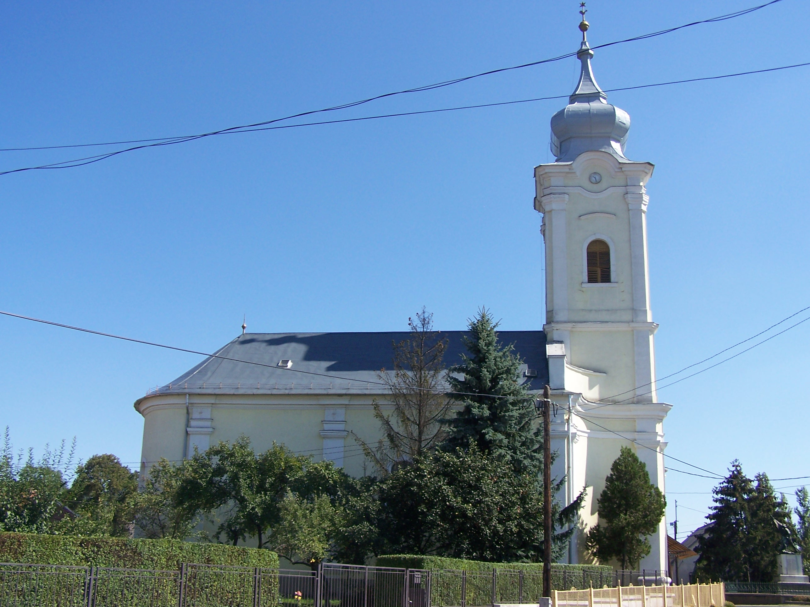 Református templom (Alsózsolca, Kossuth u.) This is a photo of a monument in Hungary. Identifier: 2649